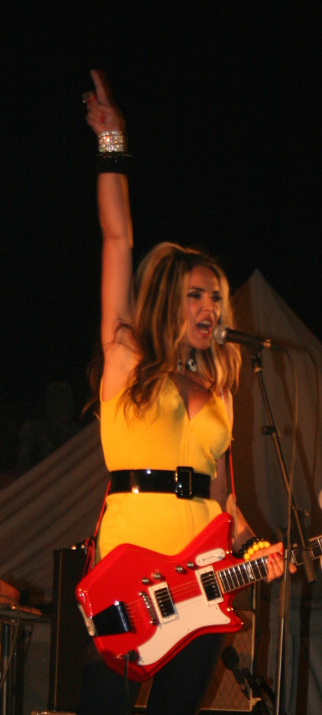 Killer Barbies. Silvia Superstar. Concerto na Praza de Fefiñáns, Cambados